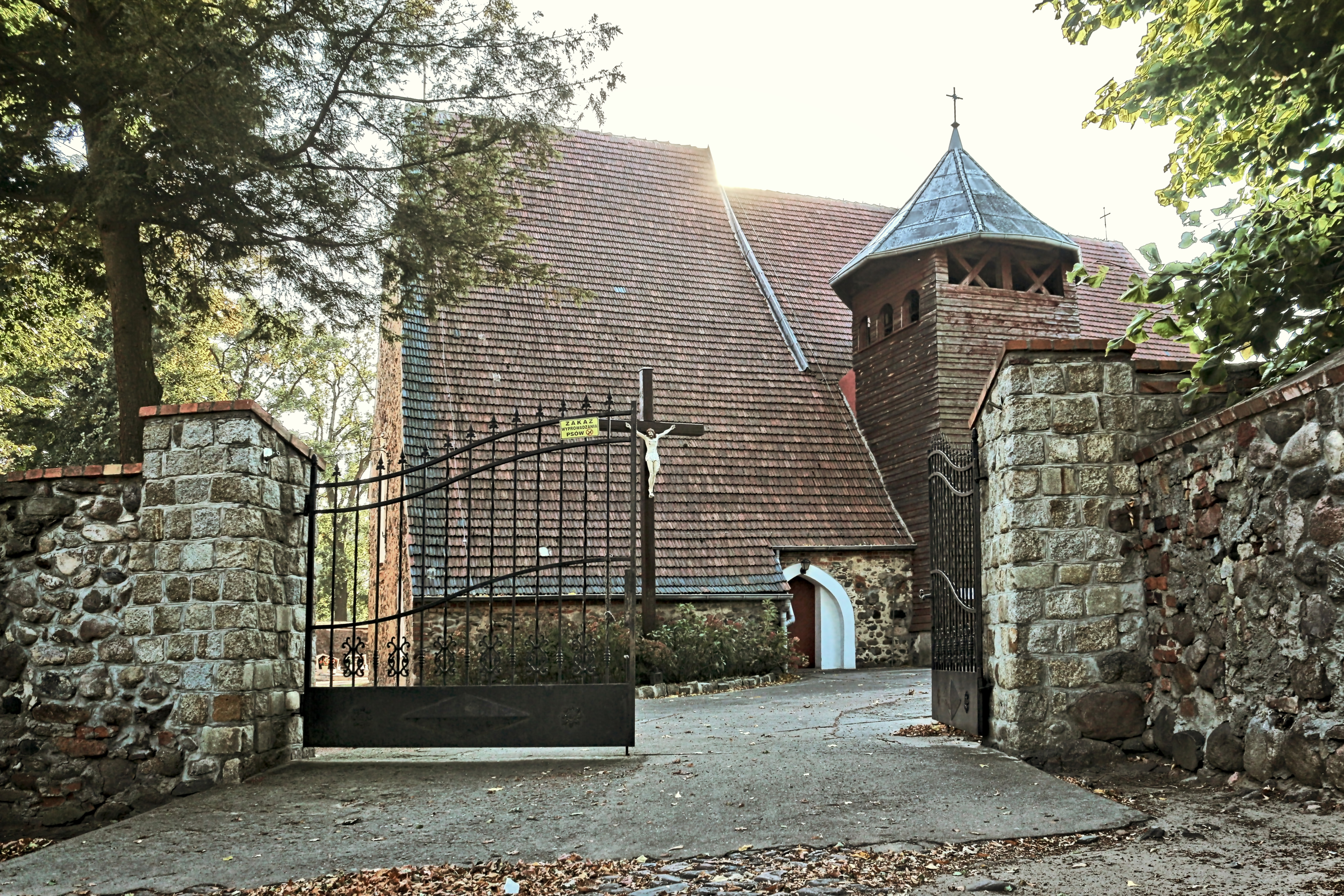 Osowa Sień, kościół